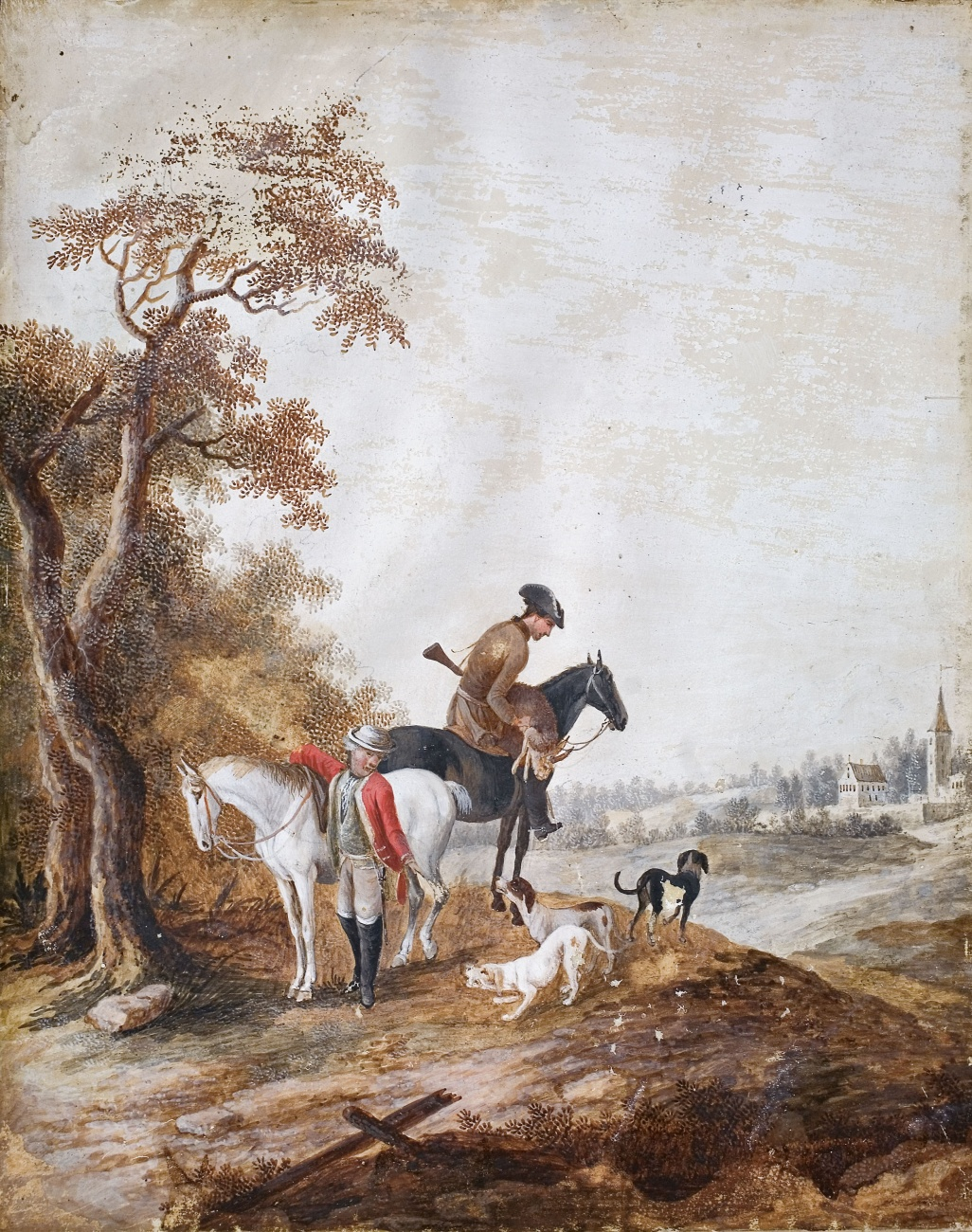 Landschaft mit Jagern I.